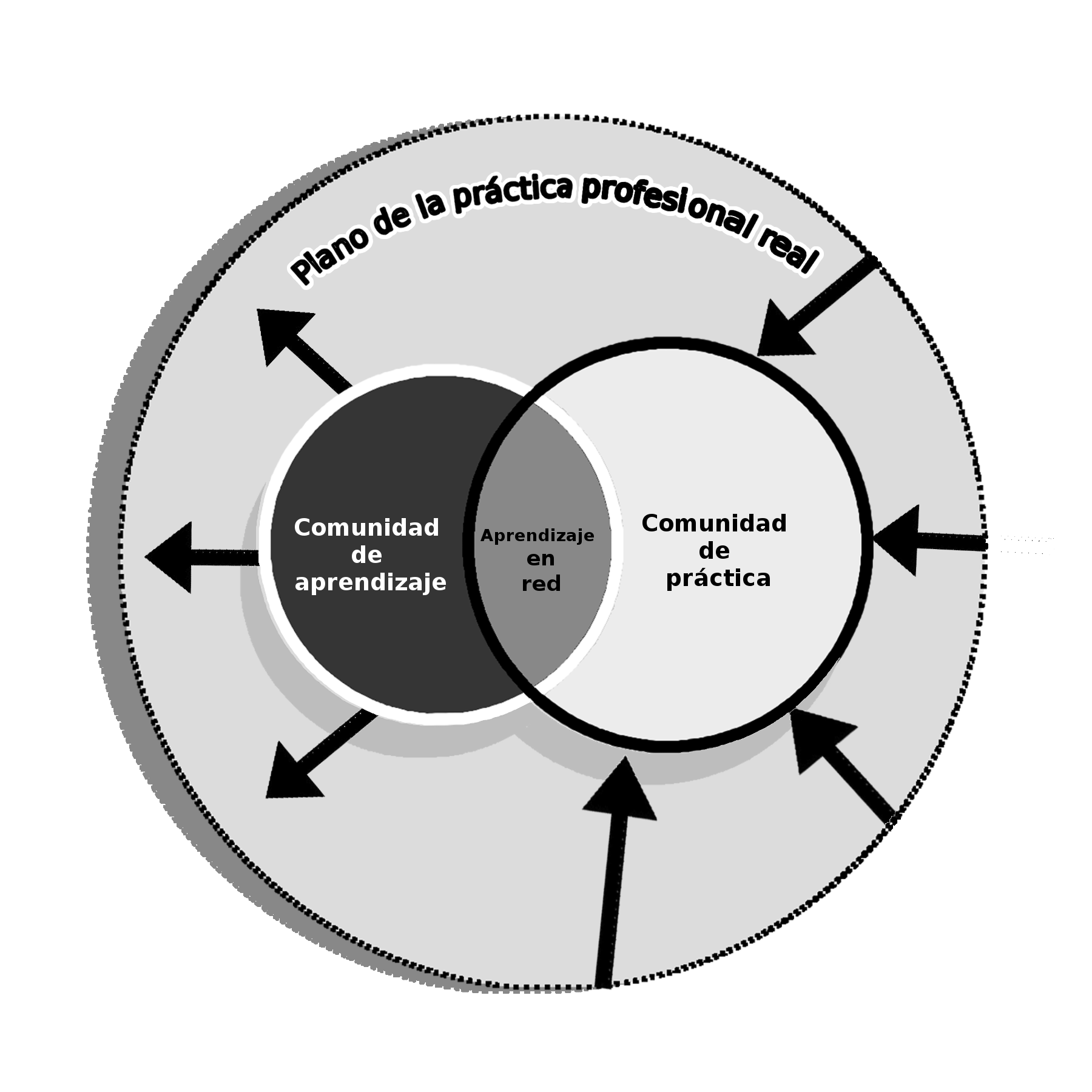 Network learning